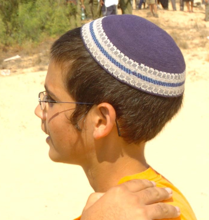 August 15, 2005. A boy wearing kippah